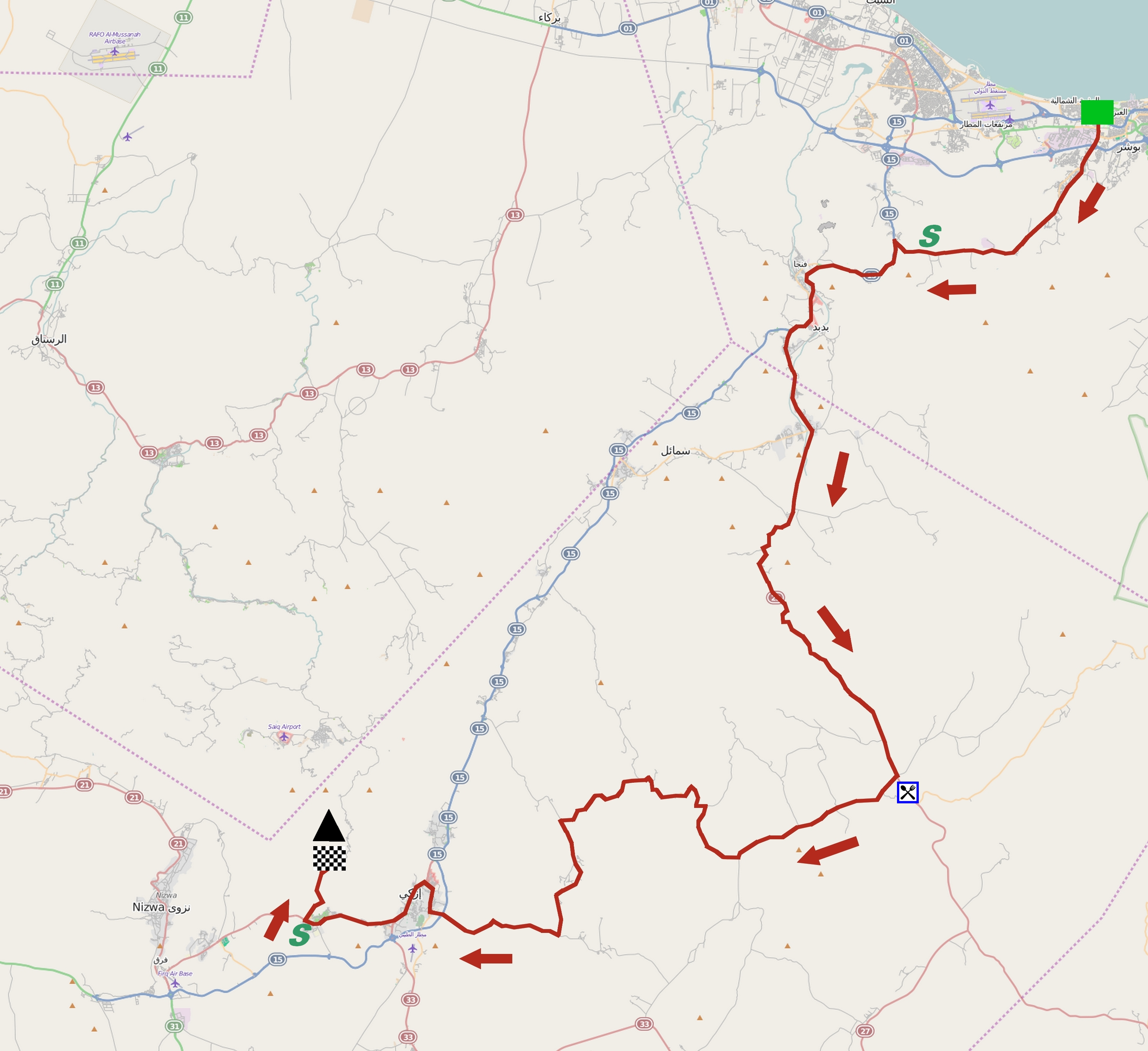 Parcours de la quatrième étape du Tour d'Oman 2015. This map may be incomplete, and may contain errors. Don't rely solely on it for navigation.